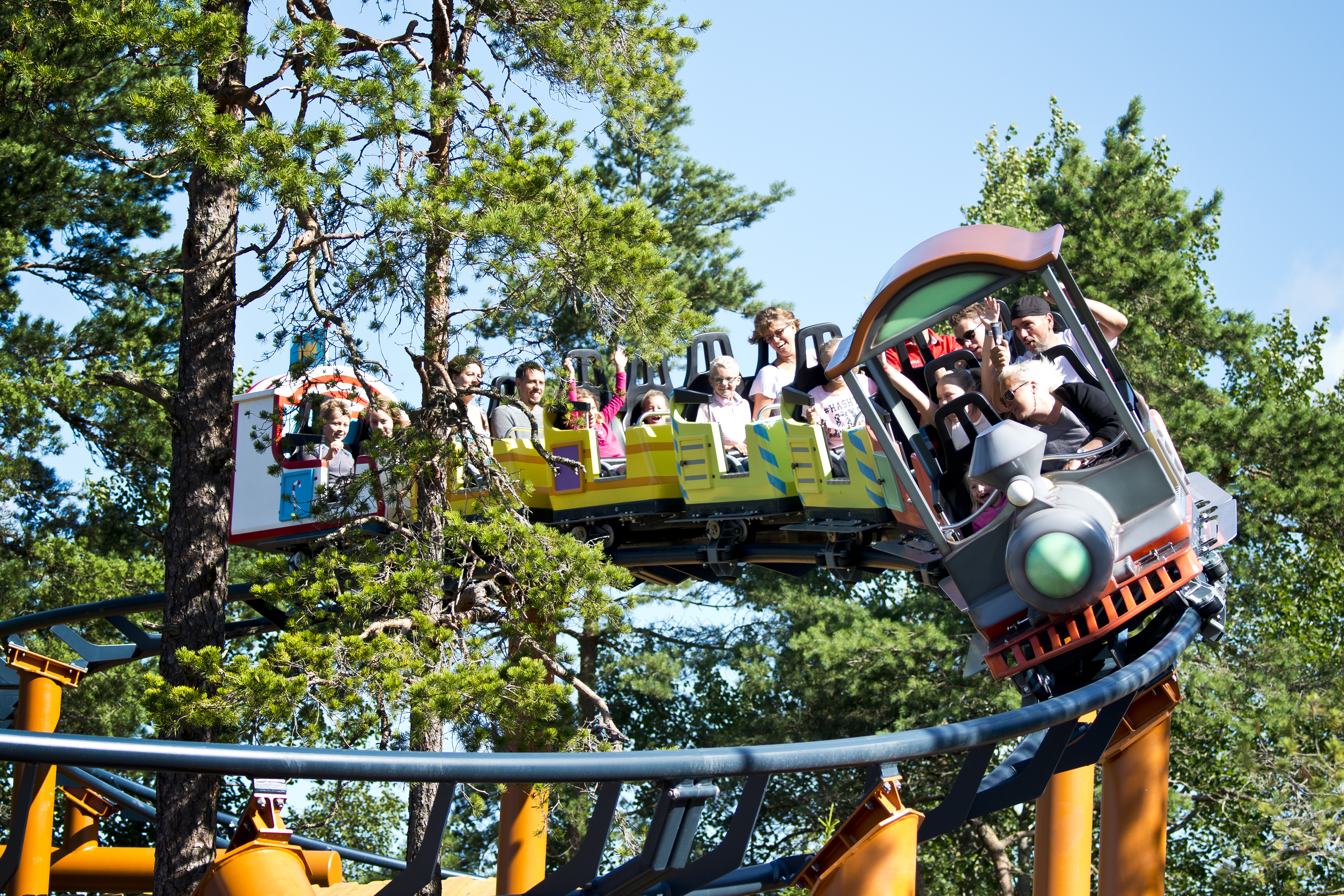 Nyöppnade Bamses värld 2015 på Kolmårdens Djurpark utanför Norrköping